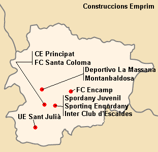 Répartition des clubs en Divisio 1A 1995-1996.